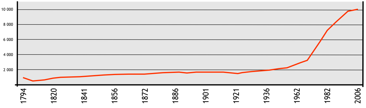 Évolution de la population communale de Panazol (Haute-Vienne, France)